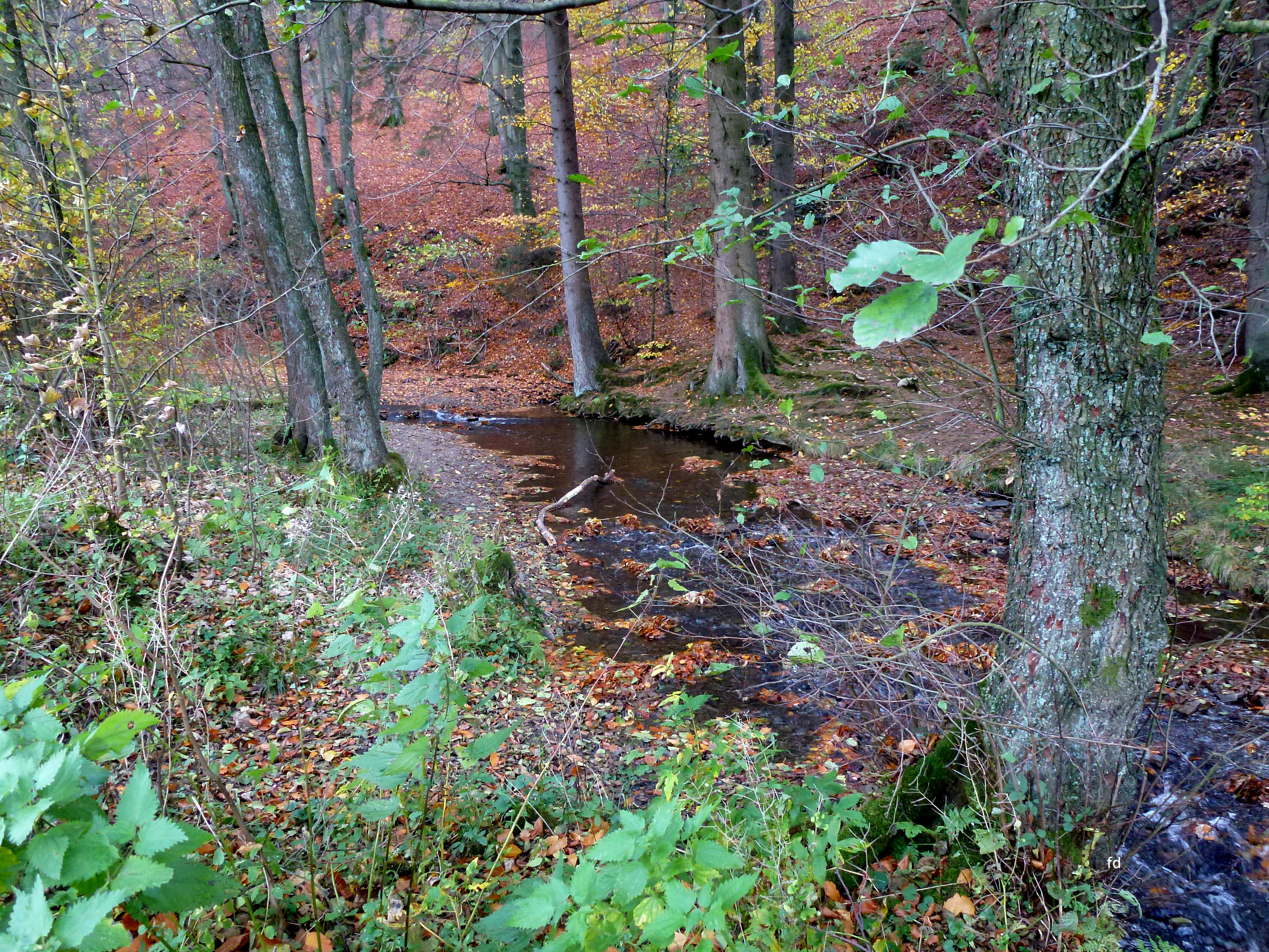 NSG Kolwederbach